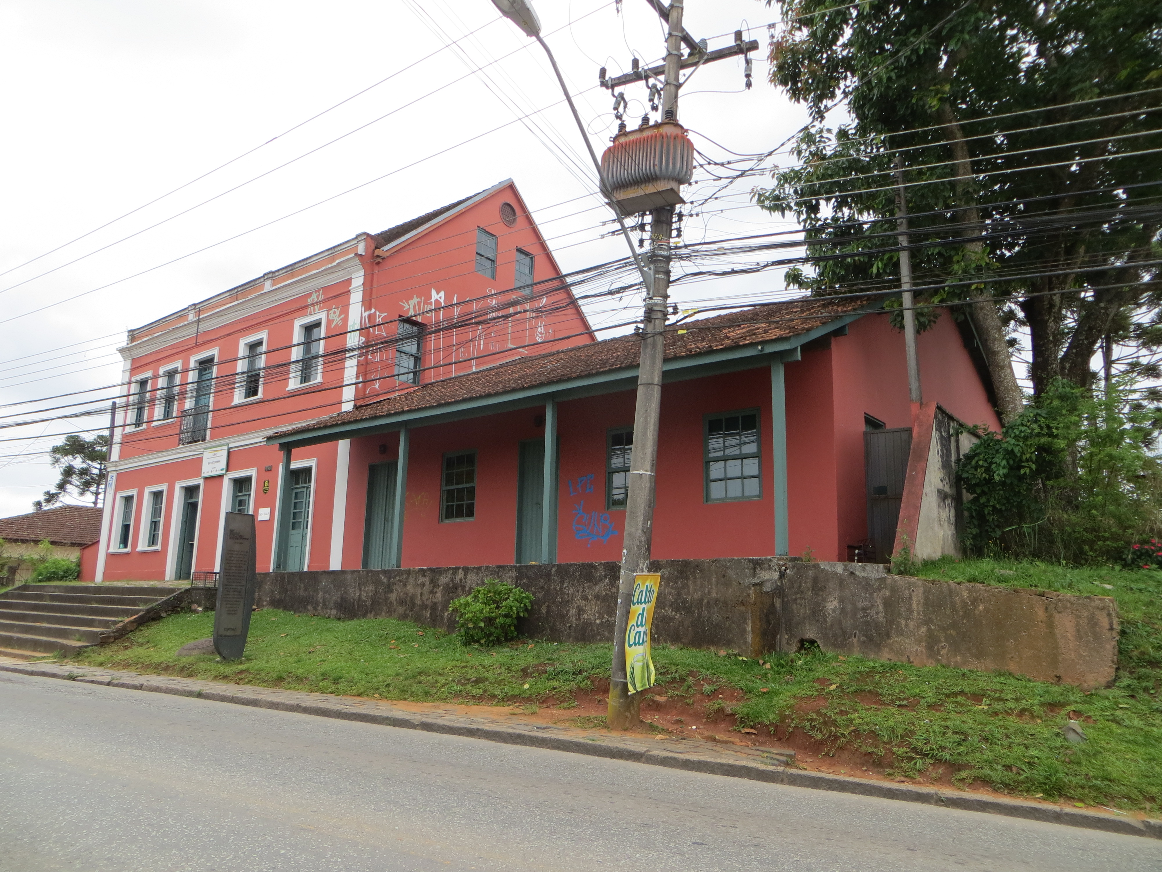 Casa Culpi, no bairro de Butiatuvinha, Curitiba, capital do estado brasileiro do Paraná, região Sul do Brasil